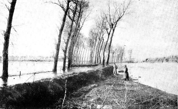 Martje-Baert westlich von Merckem